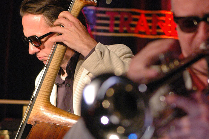 Bruno Leicht (im Bild rechts), Johannes Fink (im Bild links), Walter Gauchel, Michael Clifton im Jazzclub A-Trane, Berlin, Germany